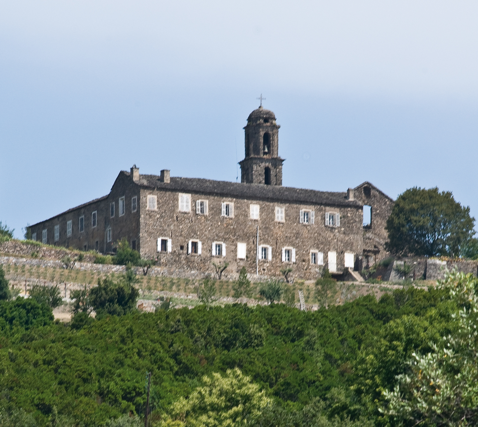 Corsu: Cunventu San Francescu di Zùani